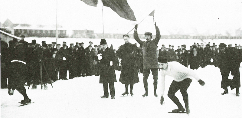 Oscar Mathisen under norgesmesterskapet på mjøsisen ved Hamar i 1907. Stevnet ble Mathisens gjennombrudd som skøyteløper.